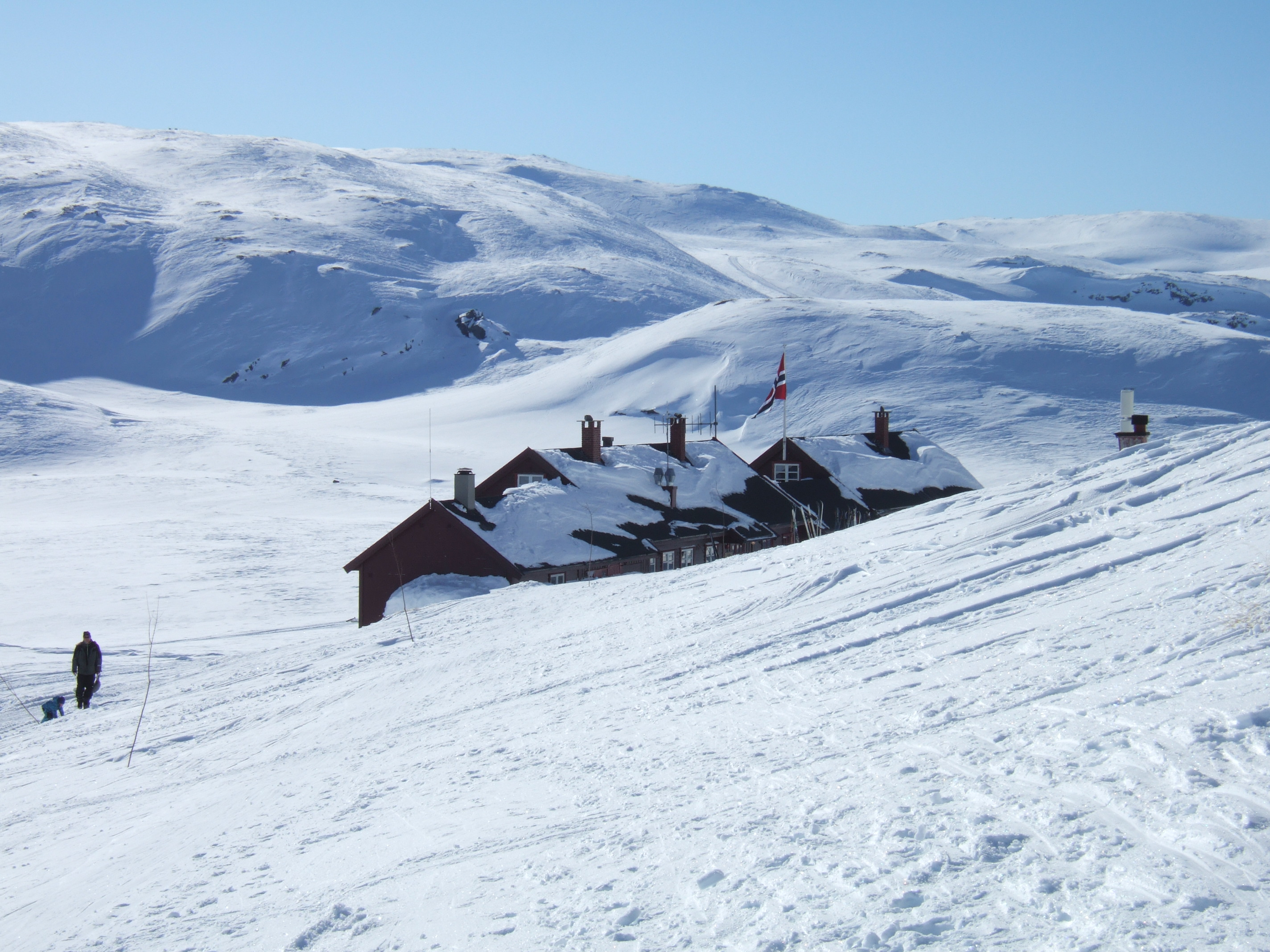 Betjent turisthytte på Hardangervidda. Bilde tatt påsken 2013.